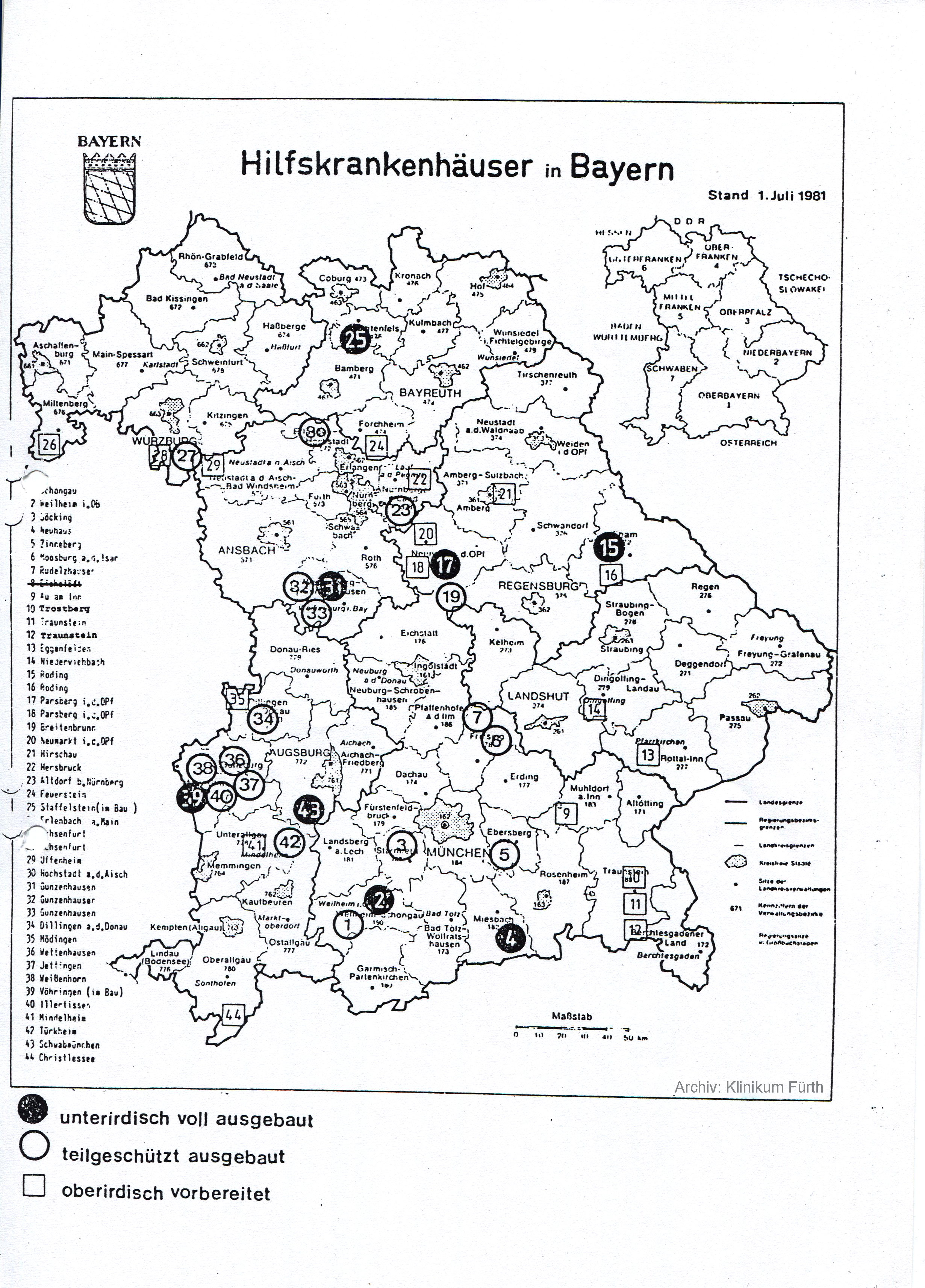 Übersicht aller Hilfskrankenhäuser in Bayern, Stand 1981